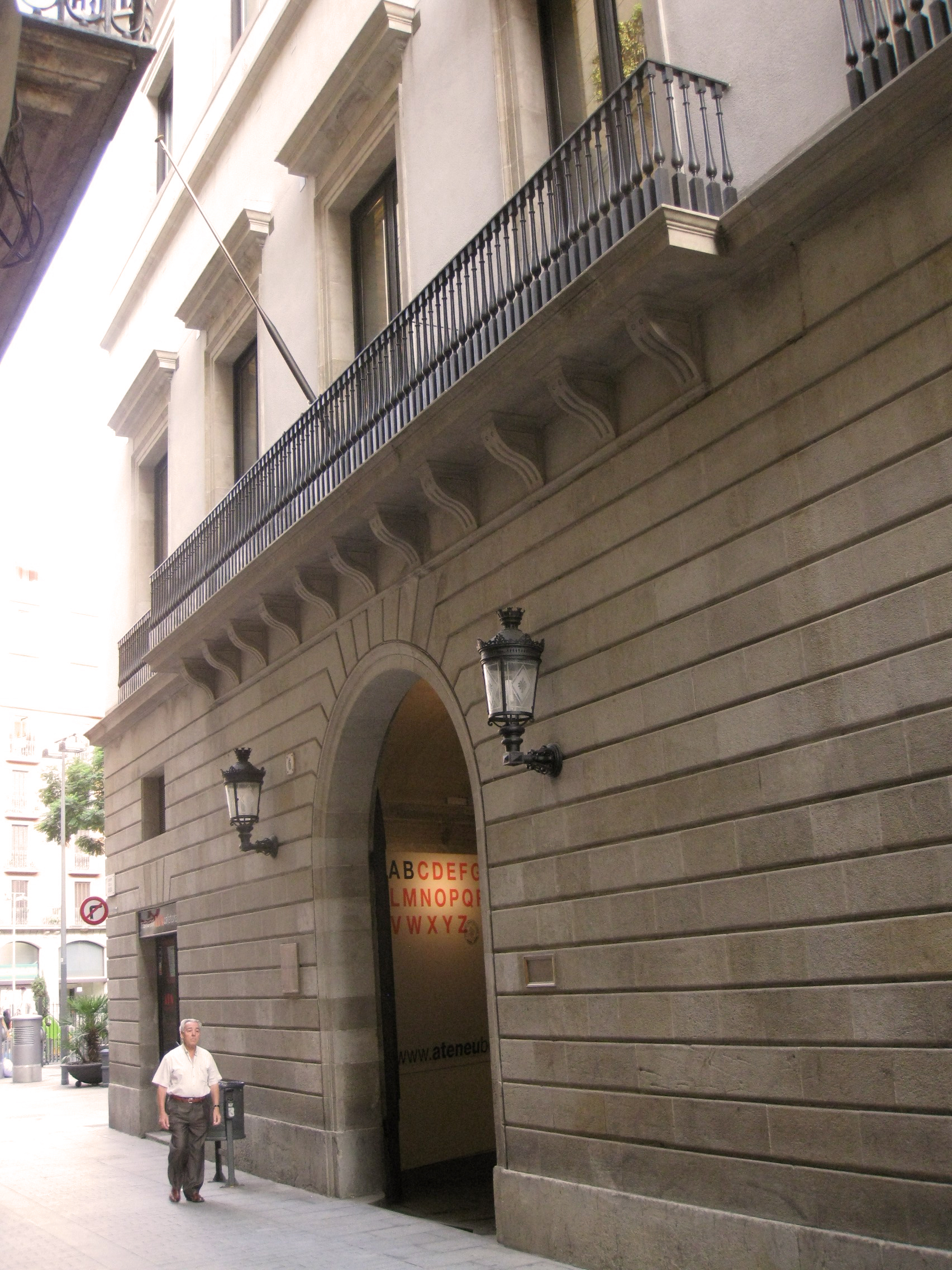 El palau Savassona, de 1796, seu de l'Ateneu Barcelonès des del 1906. Façana principal, al carrer de la Canuda.